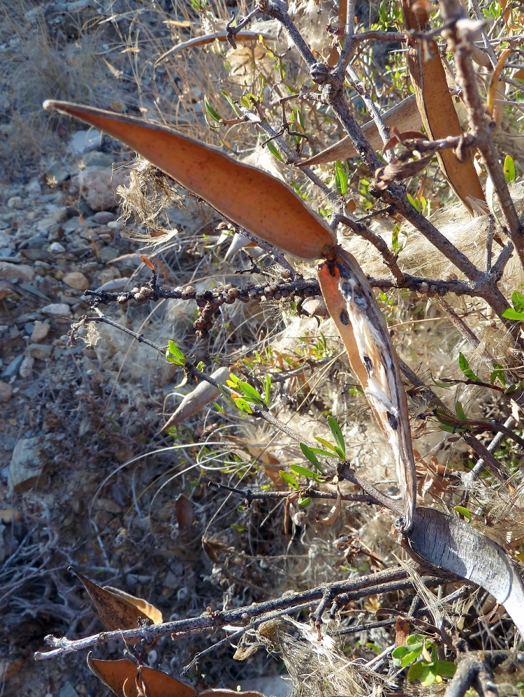 Periploca laevigata (Cornicabra): Fruto maduro y abierto con semillas - El Hornillo, Águilas (Murcia, España).